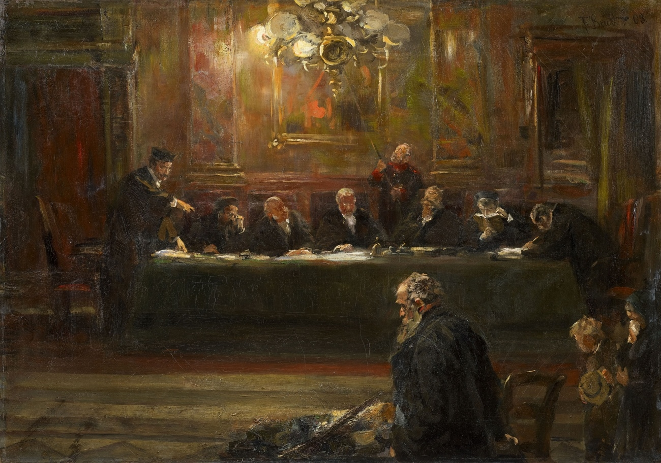 Vor den Richtern. Öl auf Leinwand. 80 x 115 cm. Signiert und datiert oben rechts: F. Brütt. 03